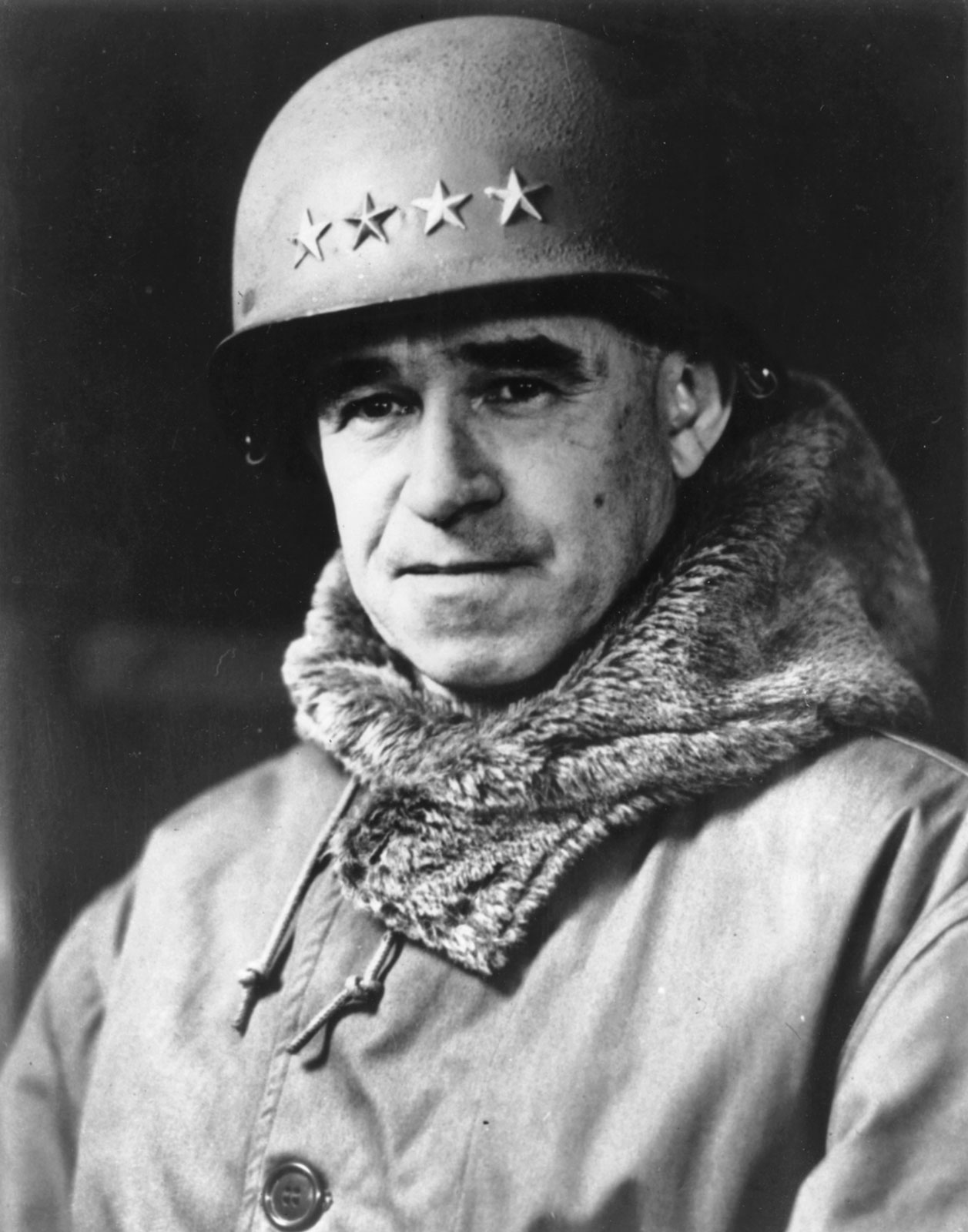 general Omar Bradley